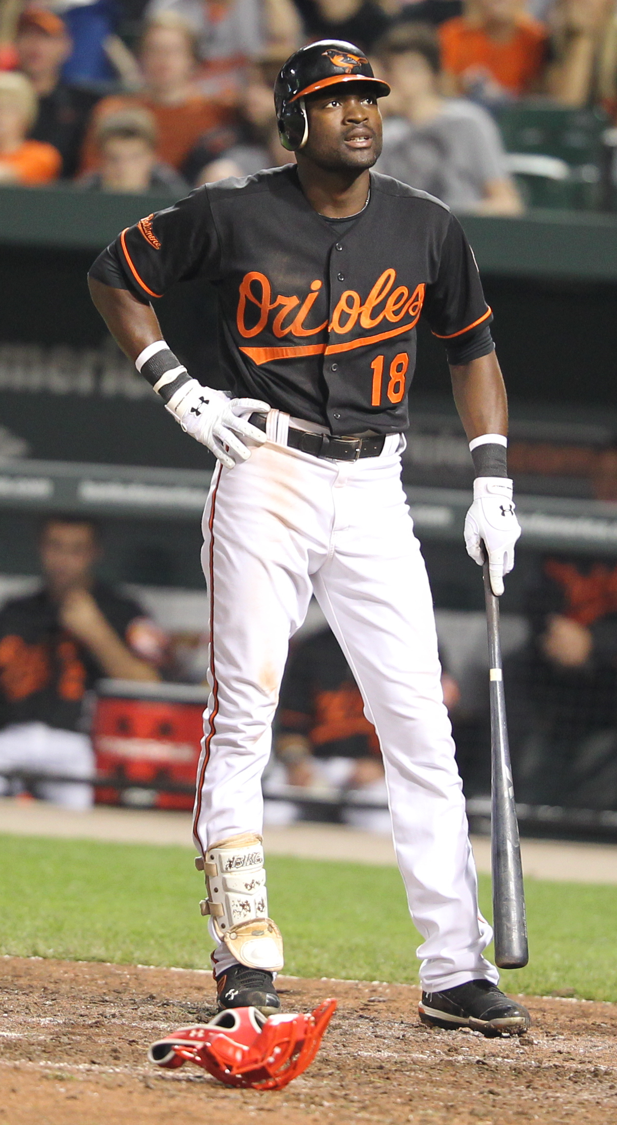 Félix Pie